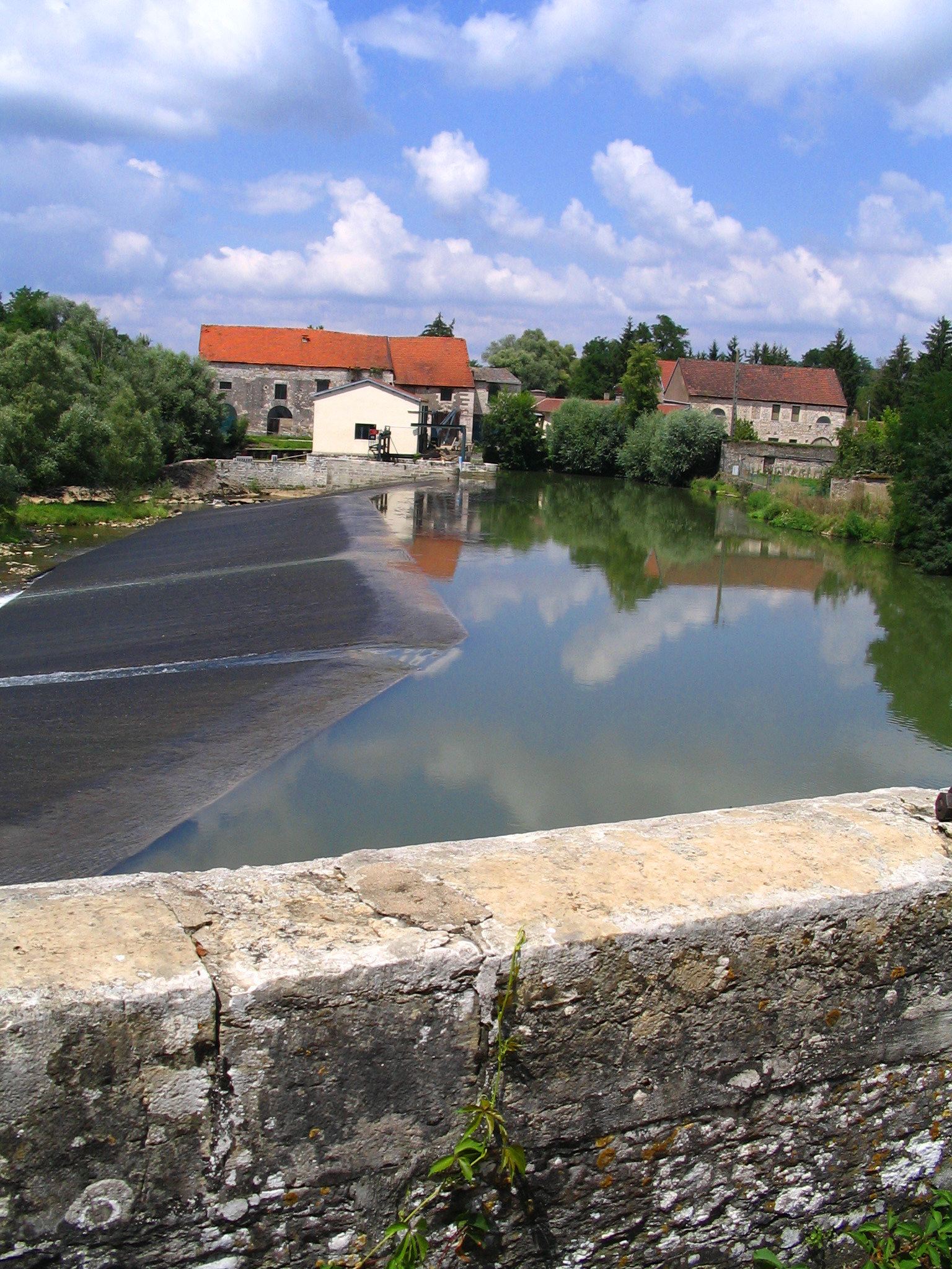 Vue des Forges de Pesmes, canal d'amenée sur l'Ognon et bâtiment des hauts-fourneaux - Pesmes - Haute-Sâone - France